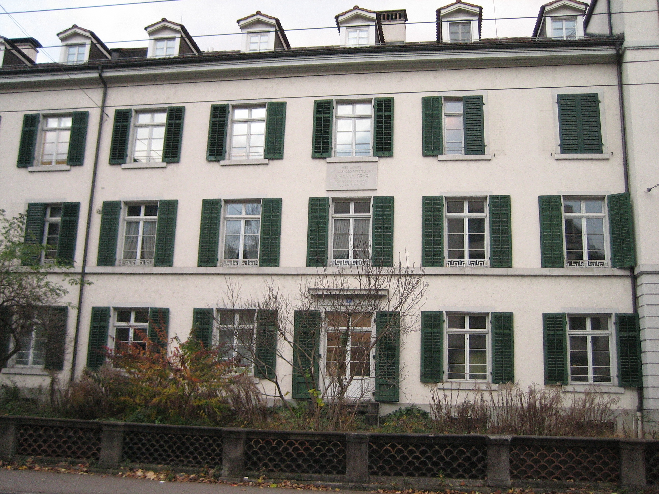 Wohnhaus von Johanna Spyri am Zeltweg in Zürich